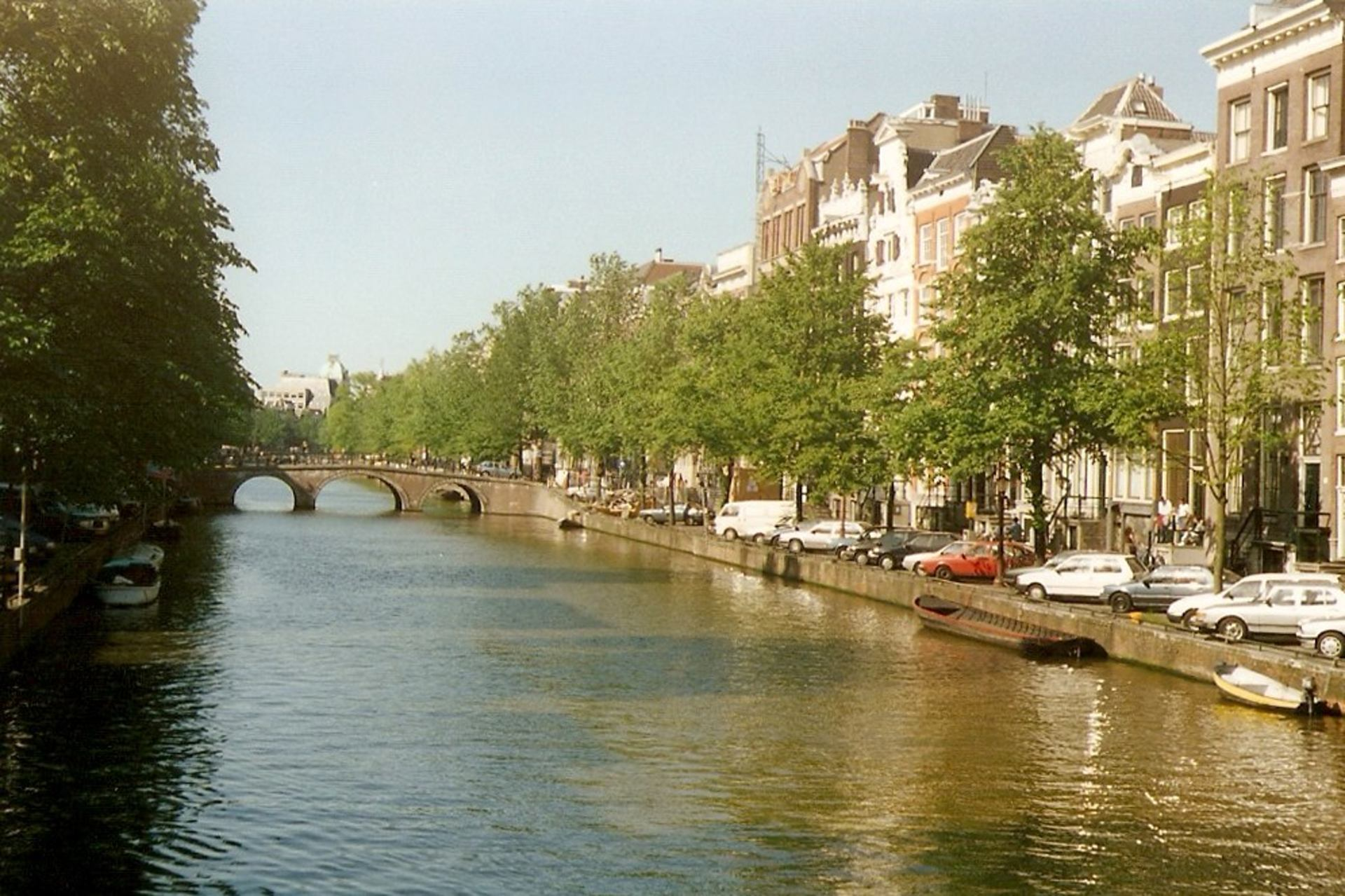 Amsterdam Keizersgracht - hlavní město Holandska